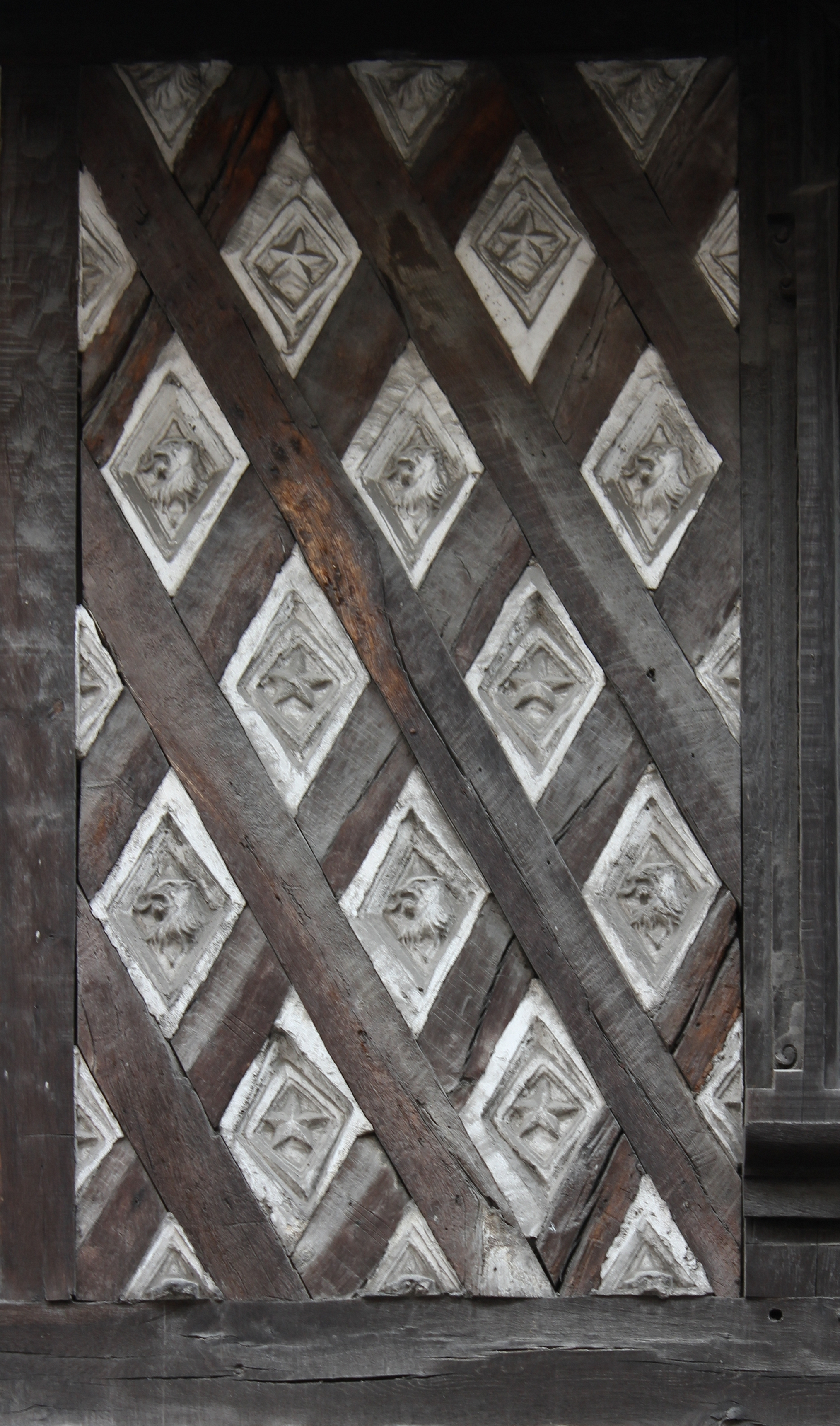 Façade sur rue de la maison natale de Pierre Corneille, aujourd'hui Musée Pierre Corneille à Rouen.